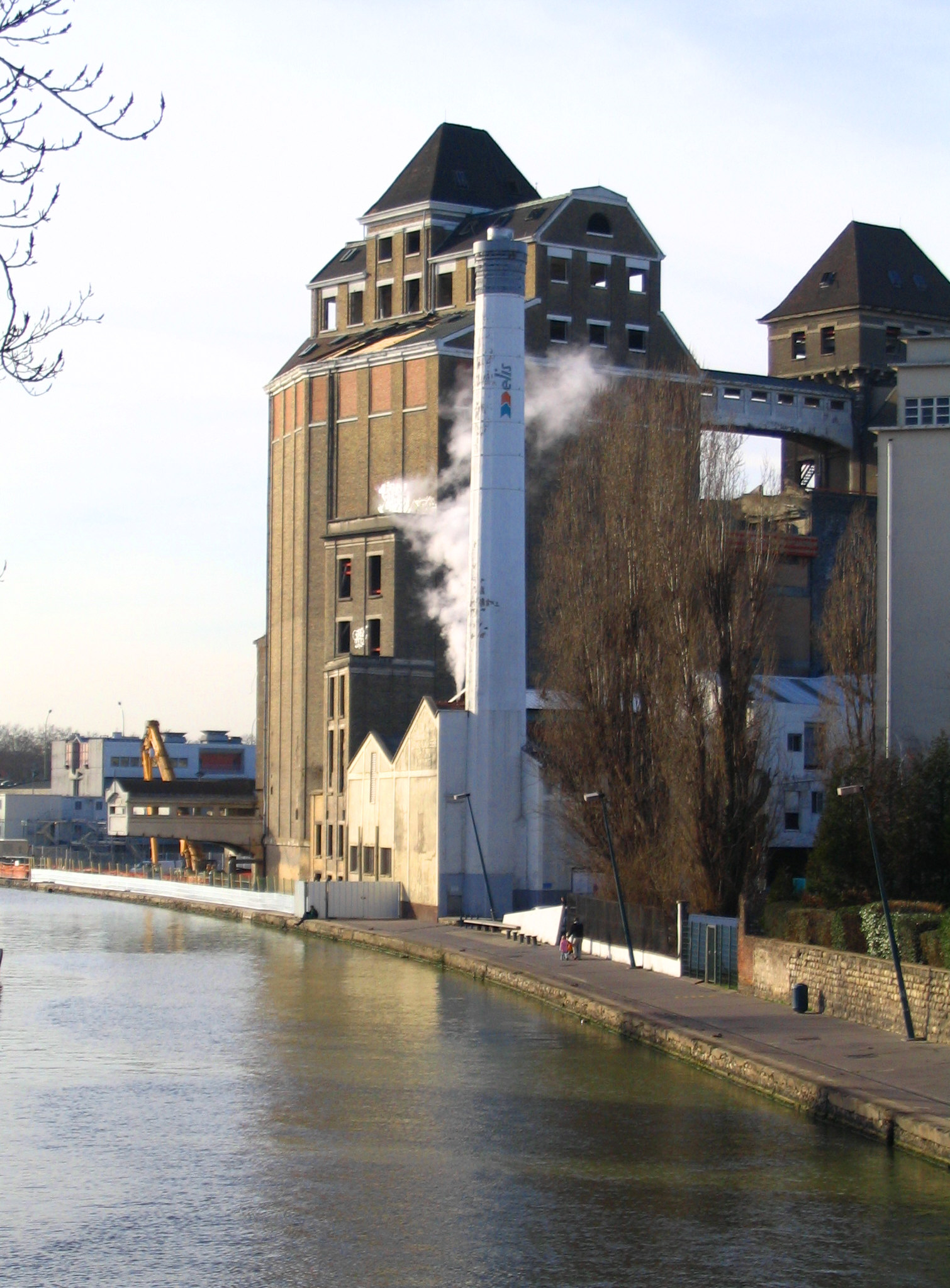 Grands Moulins de Pantin et Grande Blanchisserie - Pantin - France Auteur/author: P.Charpiat